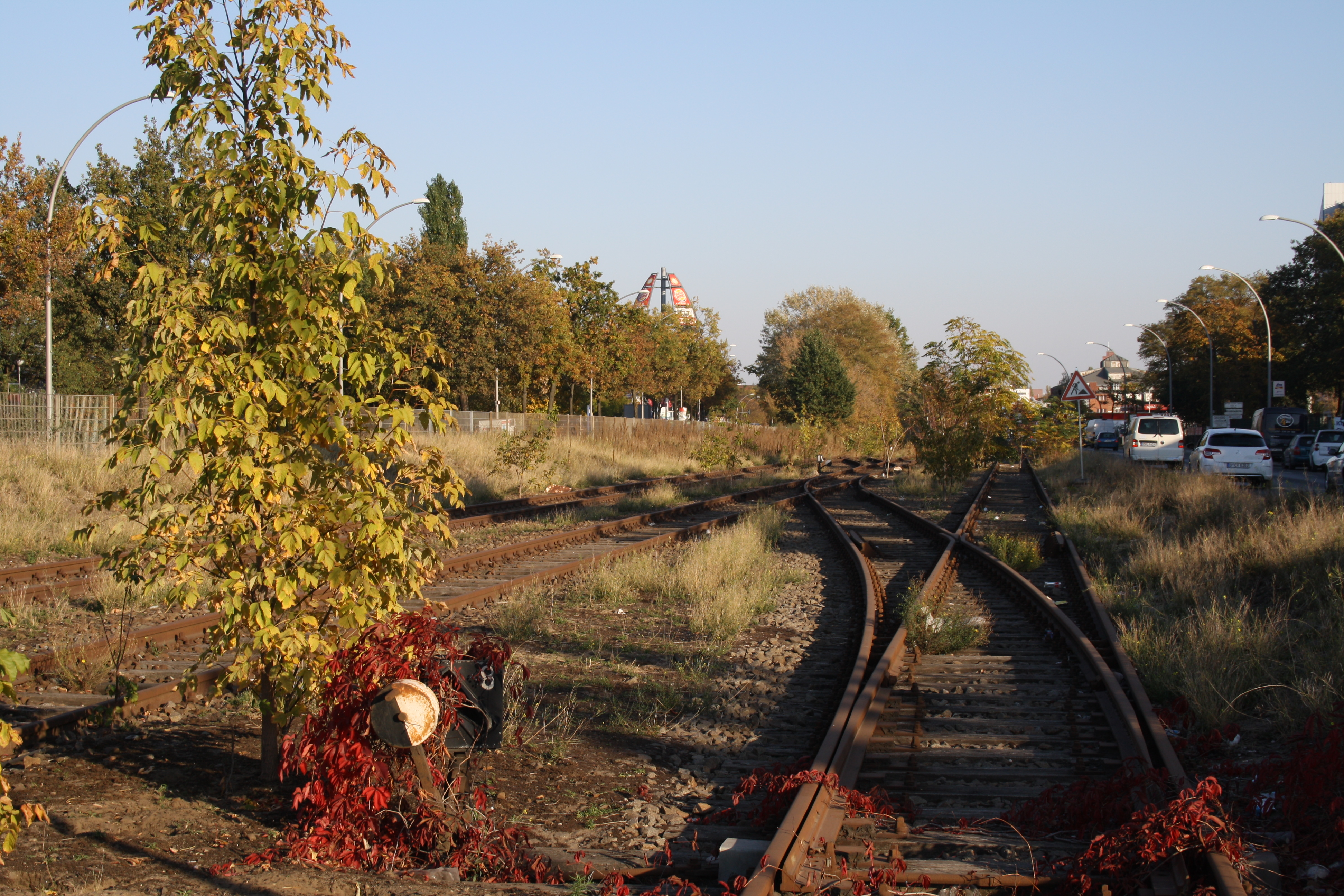 Bahnhof Nonnendammallee Berlin